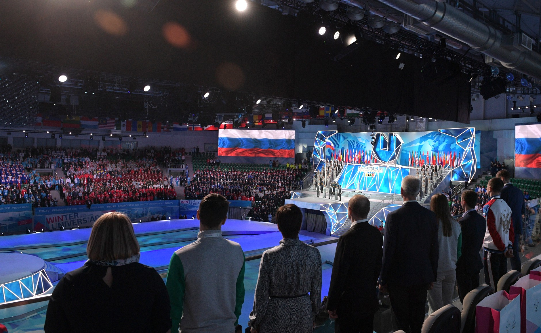 Владимир Путин посетил открытие XXIX Всемирной зимней универсиады в Красноярске. Торжественная церемония состоялась на «Платинум Арене Красноярск».